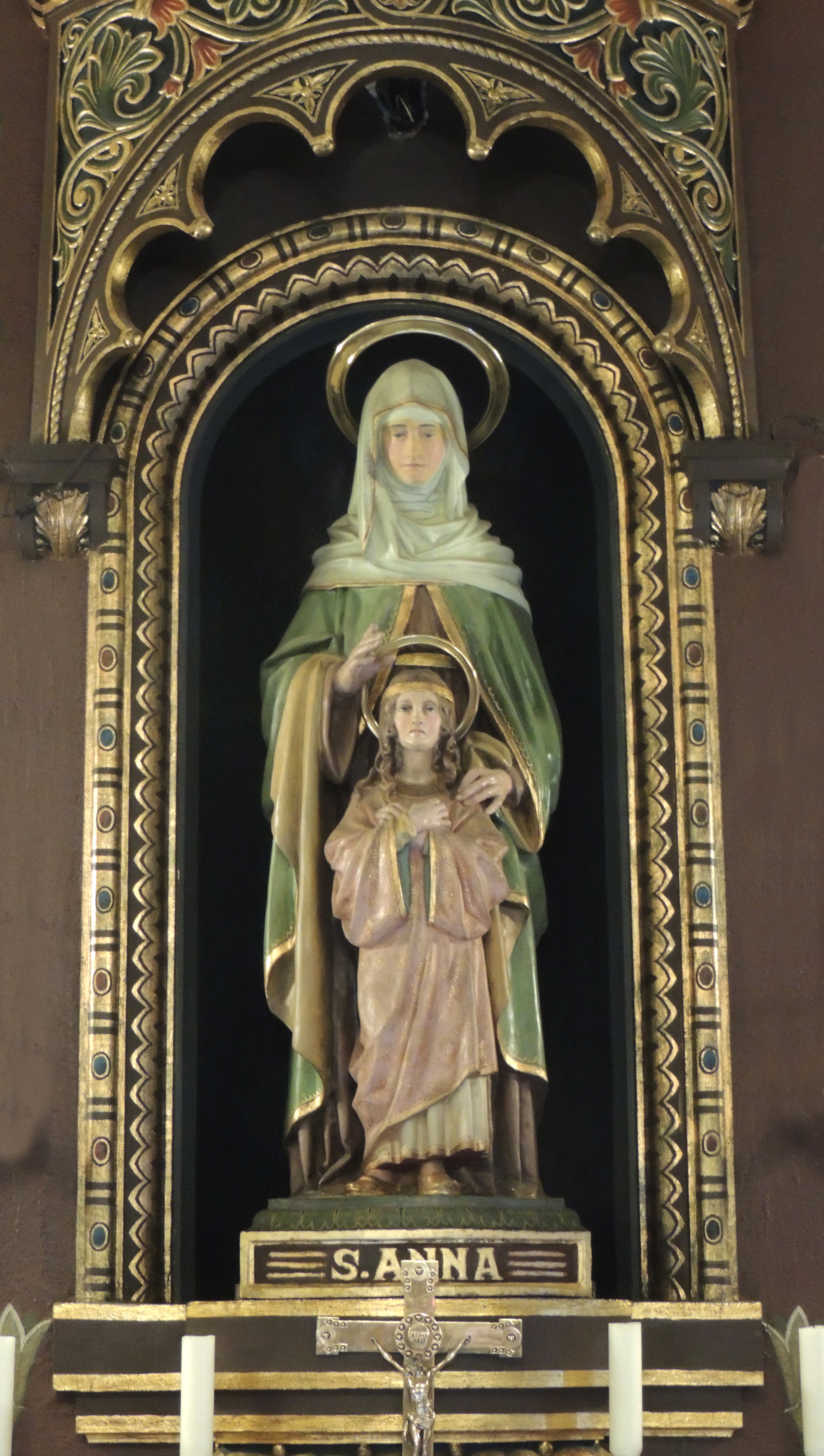 Integra um conjunto de estátuas da Basílica de Nossa Senhora da Assunção do Mosteiro de São Bento na cidade de São Paulo.Os apóstolos têm cerca de 2,80 m de altura, são feitos de gesso policromo e estão instalados na nave da igreja beneditina, a uma altura de aproximadamente 3,5 m. Moldadas por Van Emelen em seu ateliê no Palácio das Indústrias, São Paulo, entre 1920 e 1922, as estátuas teriam sido inauguradas no dia da consagração da basílica, em 1922.